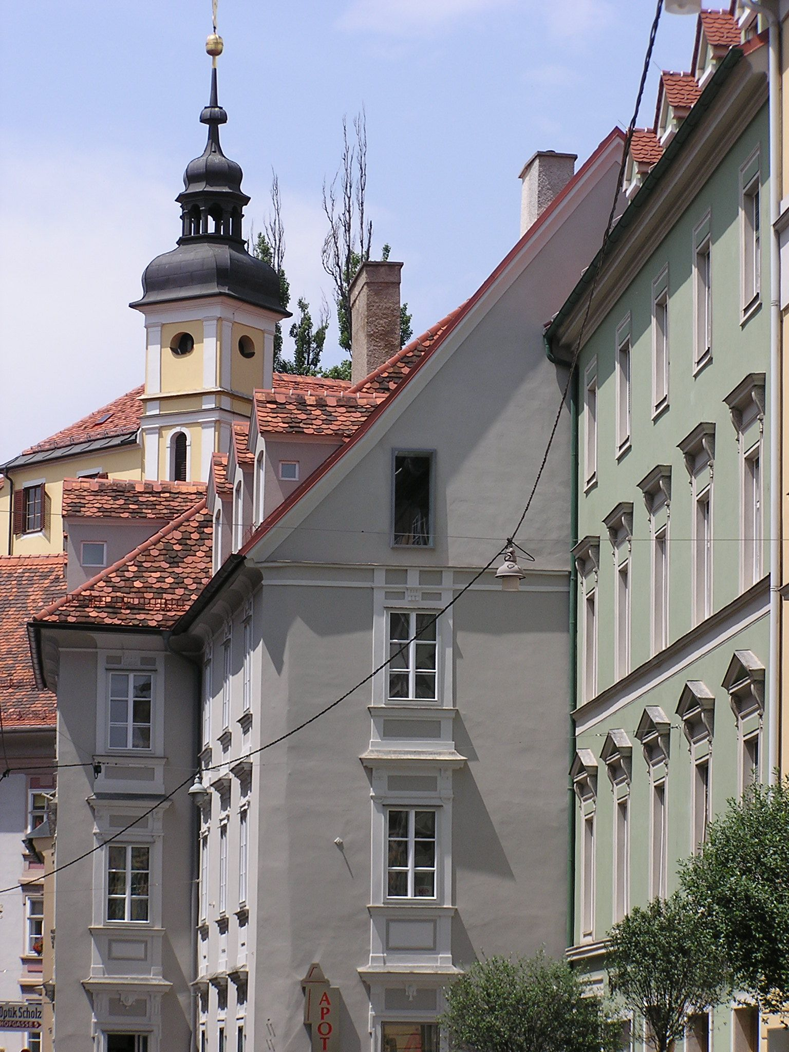 Hofgasse mit dem Kirchturm der Stiegenkirche